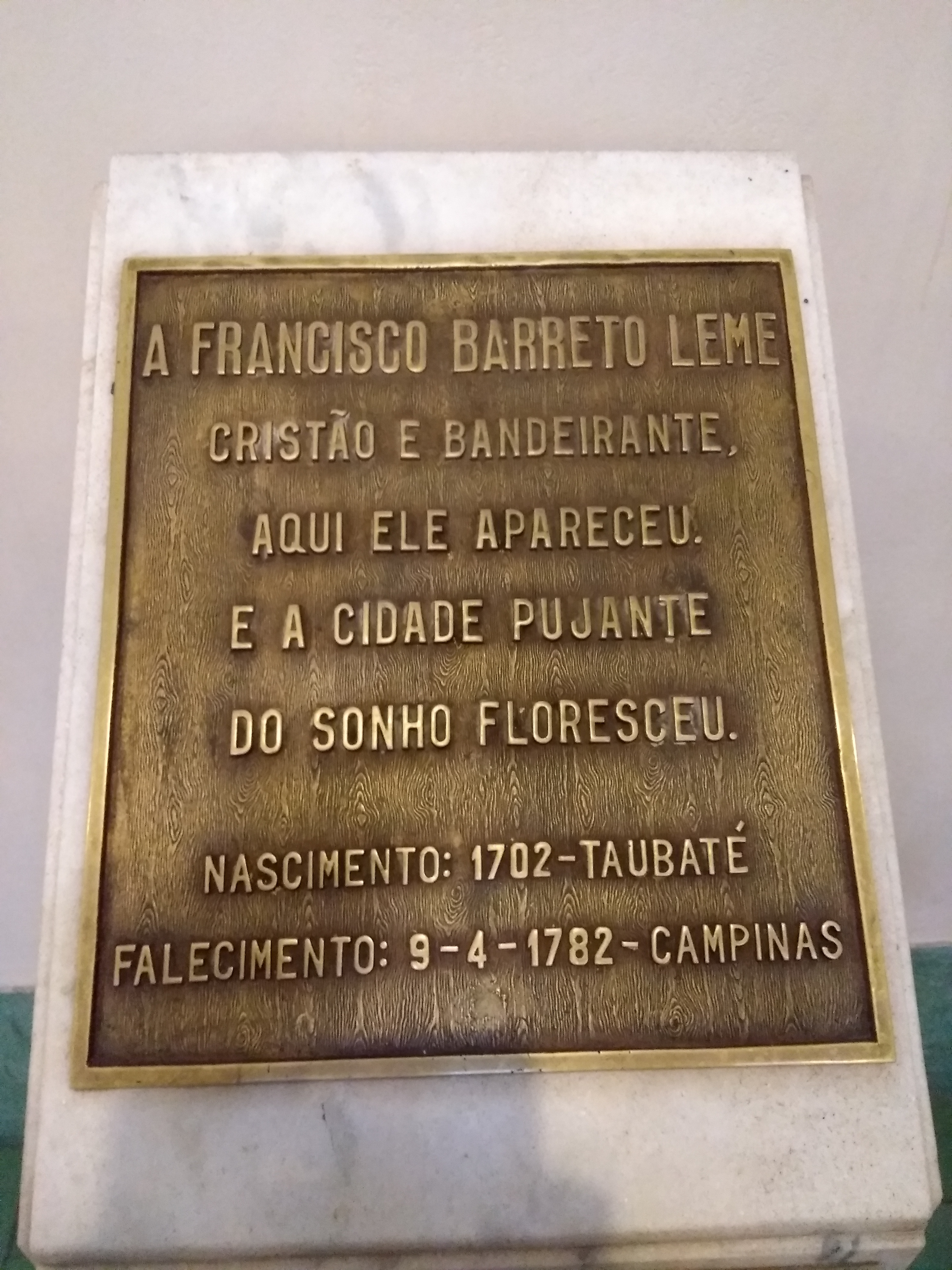 Túmulo de Francisco Barreto Leme do Prado na Basílica Nossa Senhora do Carmo.